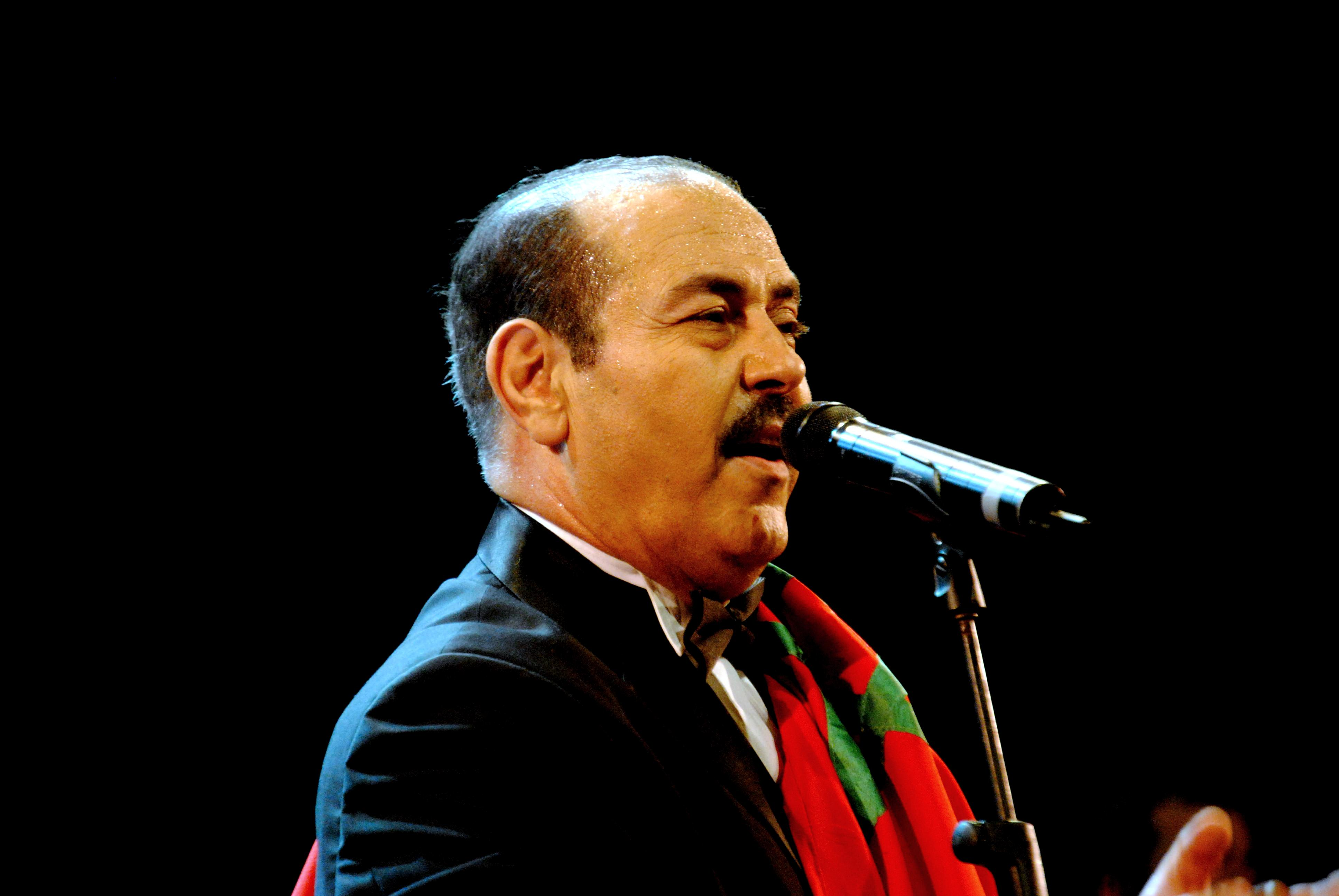 Lotfi Bouchnak au Festival de Mawazine 2013 au théâtre Mohamed V à Rabat